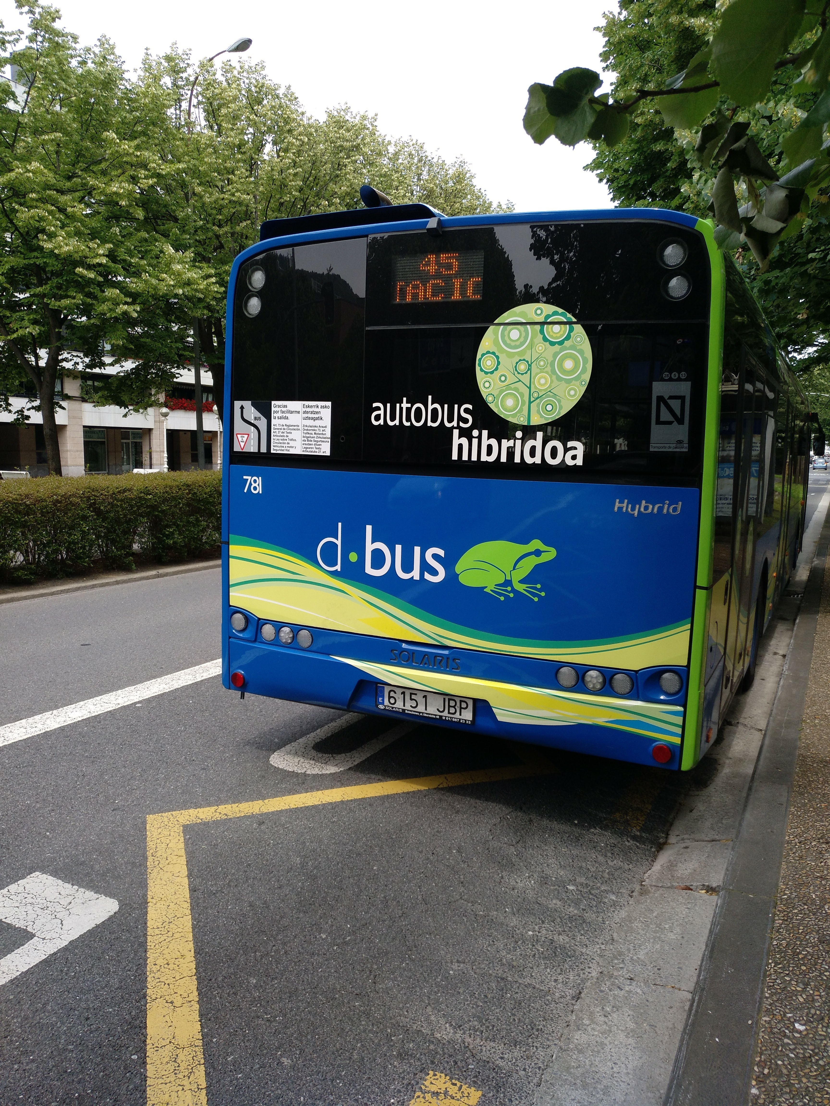 Autobús urbano de d·bus en San Sebastián en la avenida Tolosa